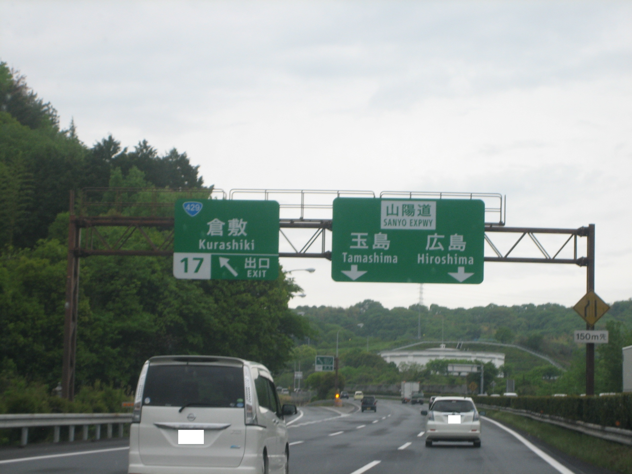 倉敷IC出口